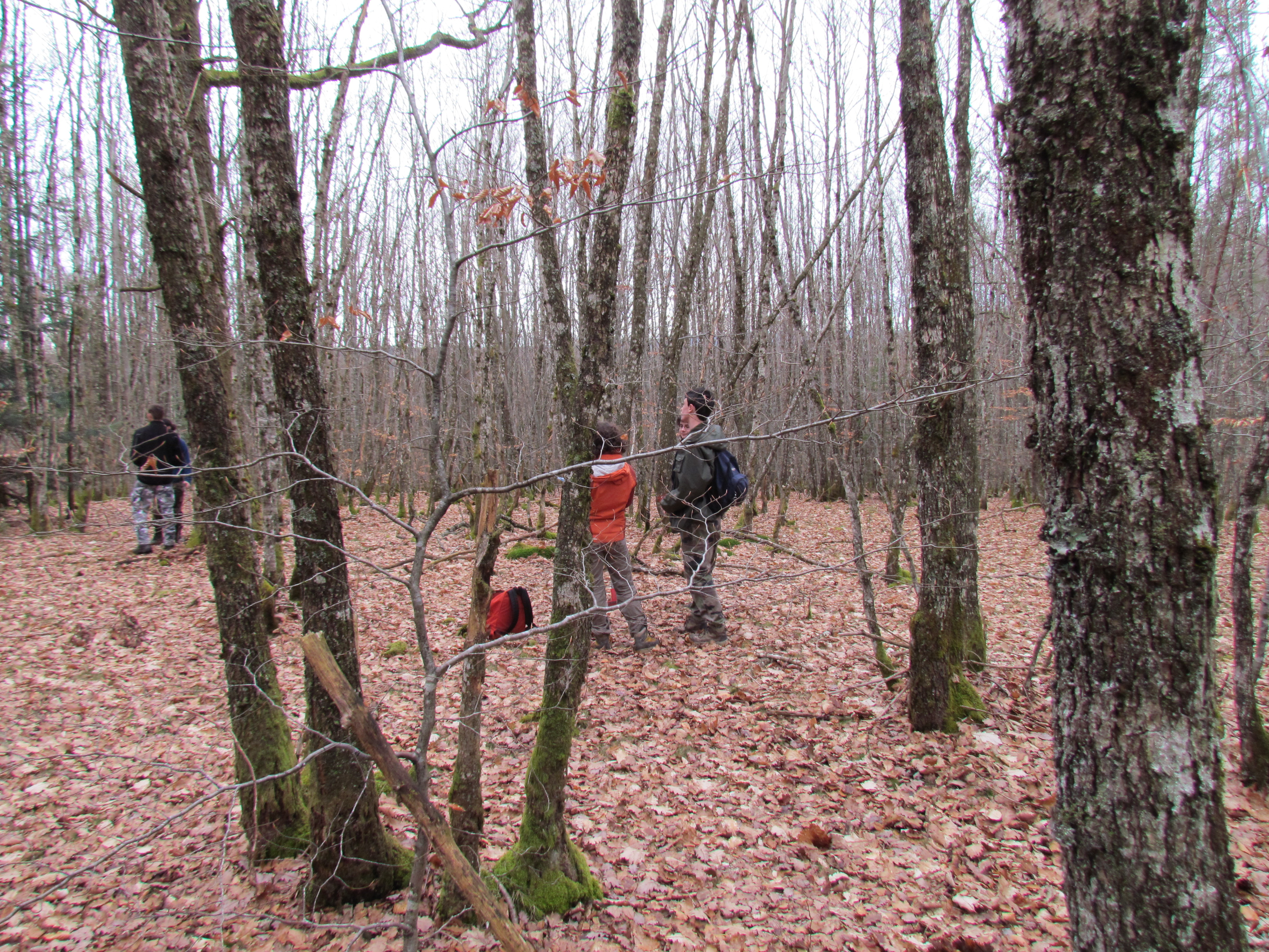 Vieux taillis simple de Chêne sessile près d'Ussel (Corrèze)